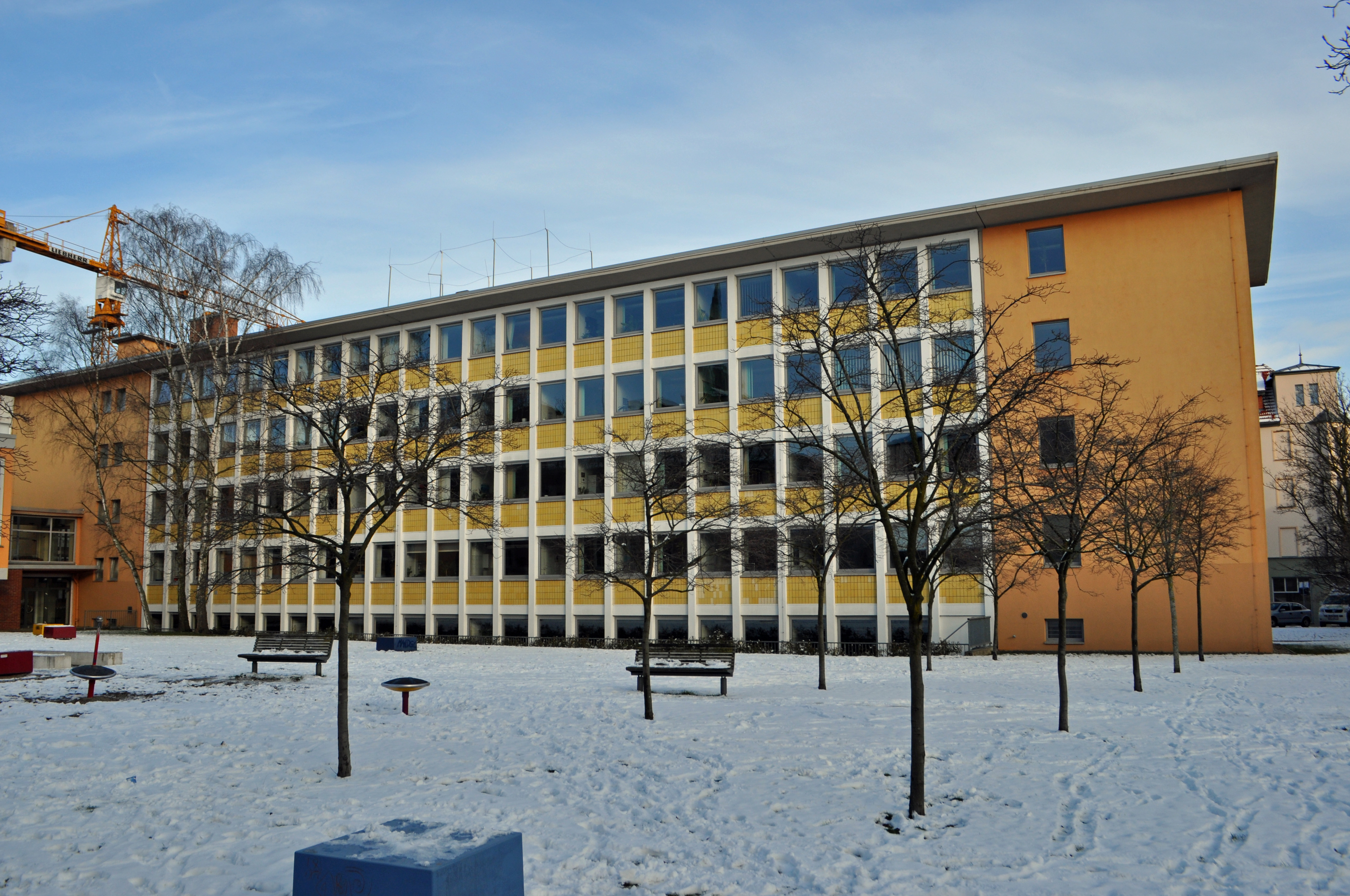 Stralsund, Heilgeiststraße 60 (2013-02-11), by Klugschnacker in Wikipedia This is a photograph of an architectural monument.